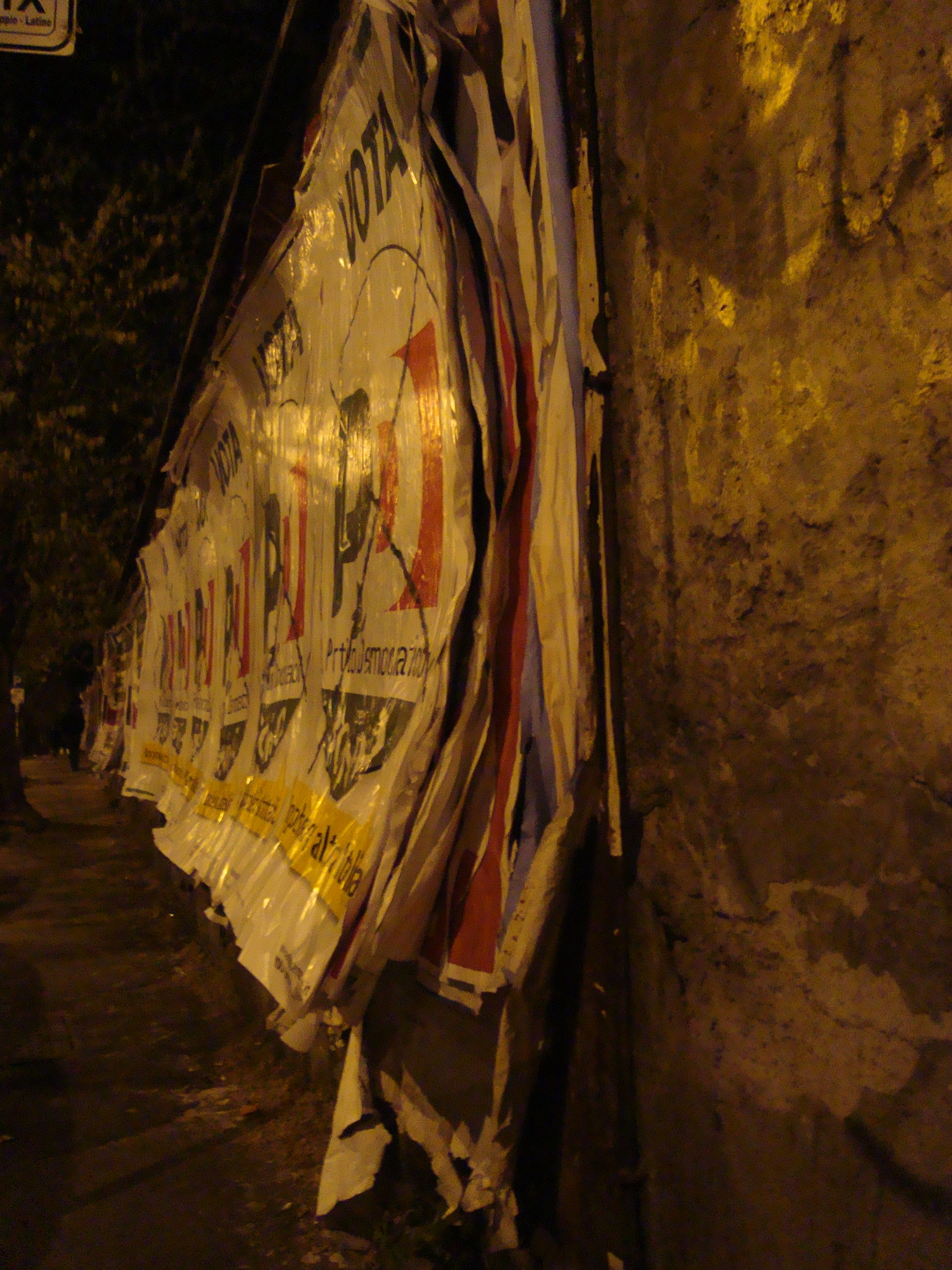 Les affiches électorales du Partito democratico italien lors des élections régionales italienne des 28-29 mars 2010 à Rome